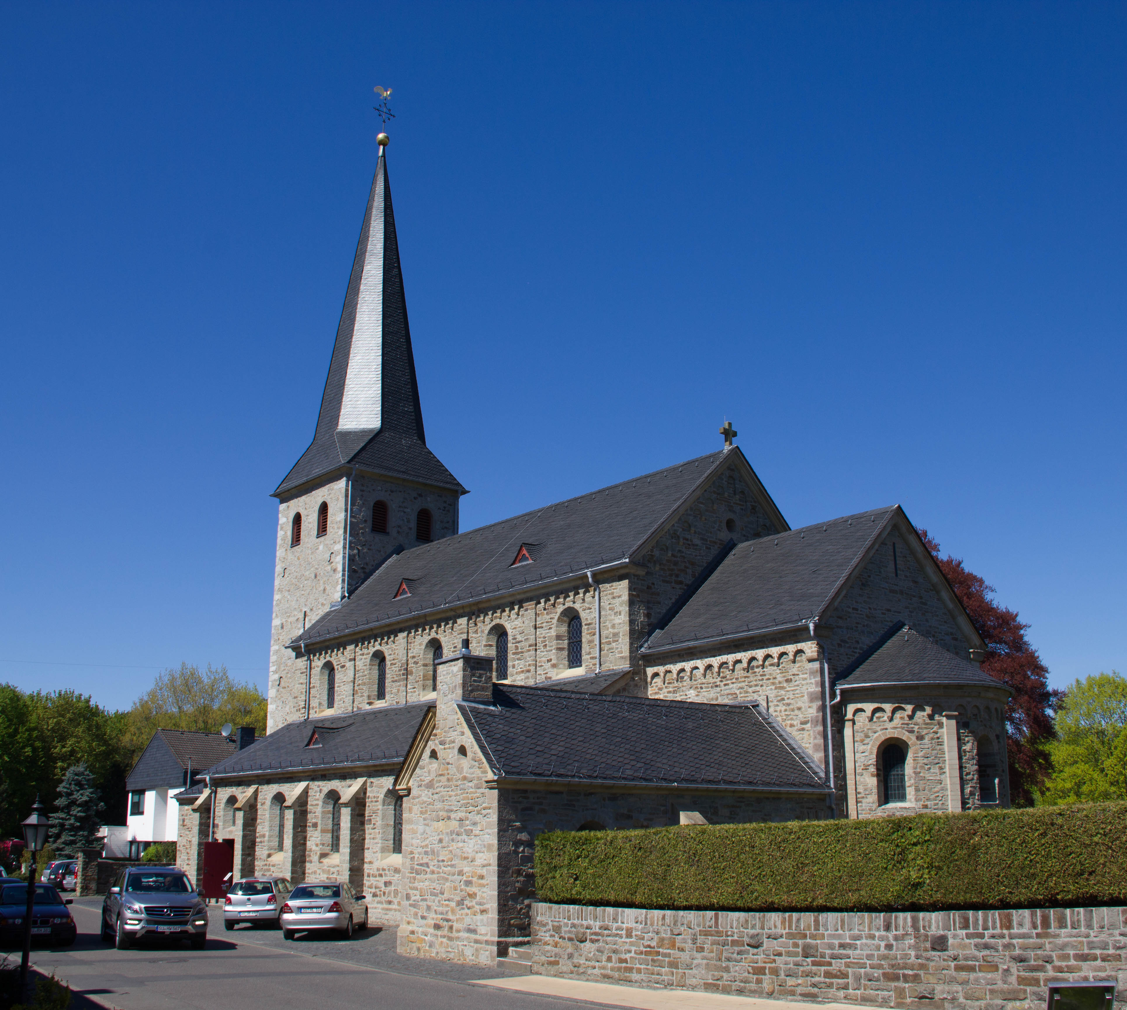 Katholische Pfarrkirche „Sankt Johannes Enthauptung" am 16. April 2014